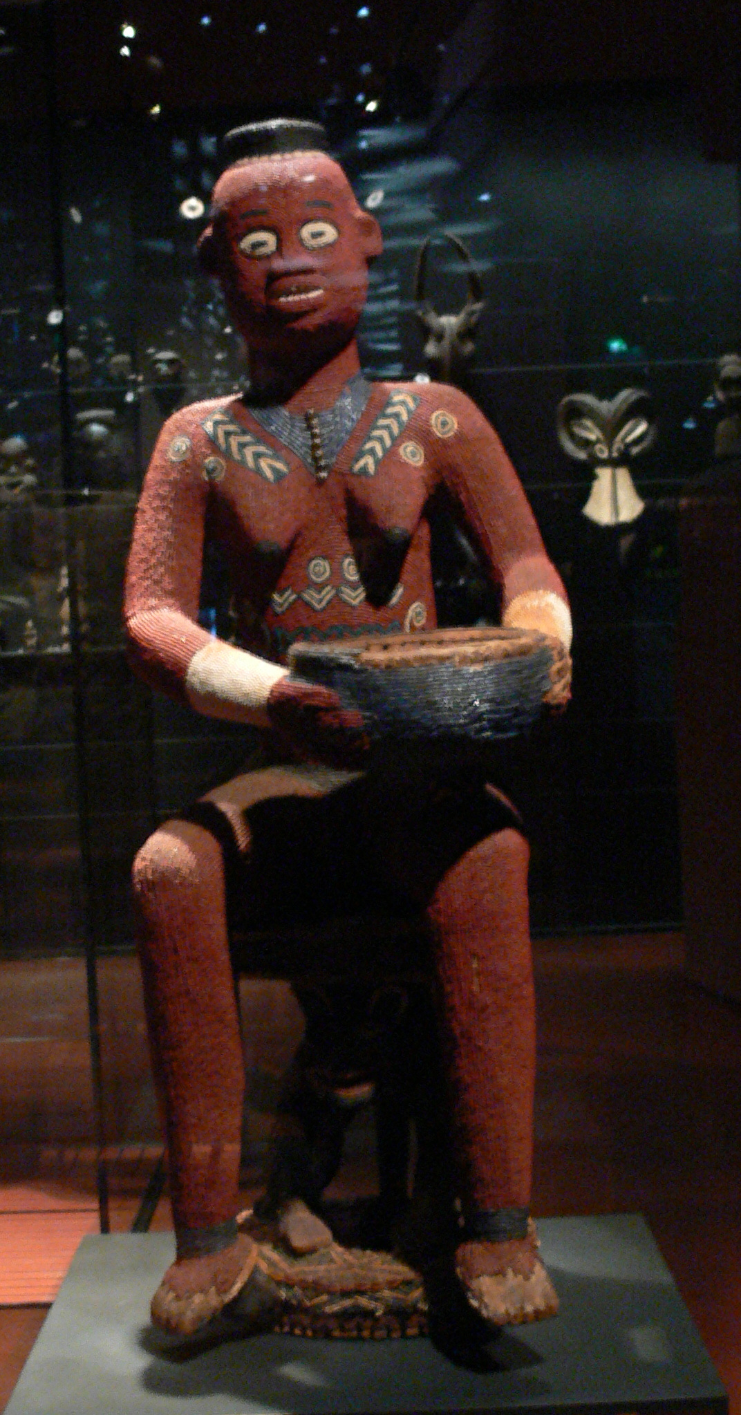 Exhibit at the Musée du quai Branly, Paris, France